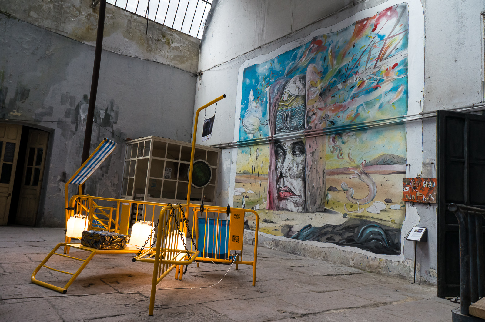 Laguna Atocha